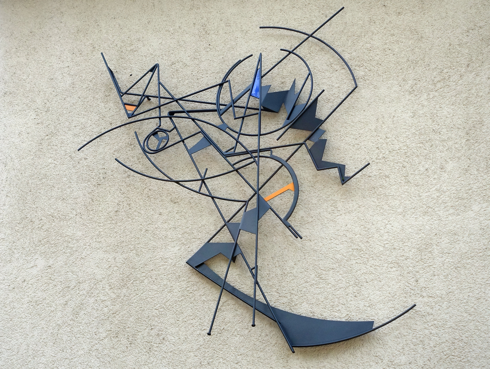 Walter Bodmer (1903–1963) Maler, Bildhauer. Metallrelief, 1961–1963, Bruderholzschule, Basel